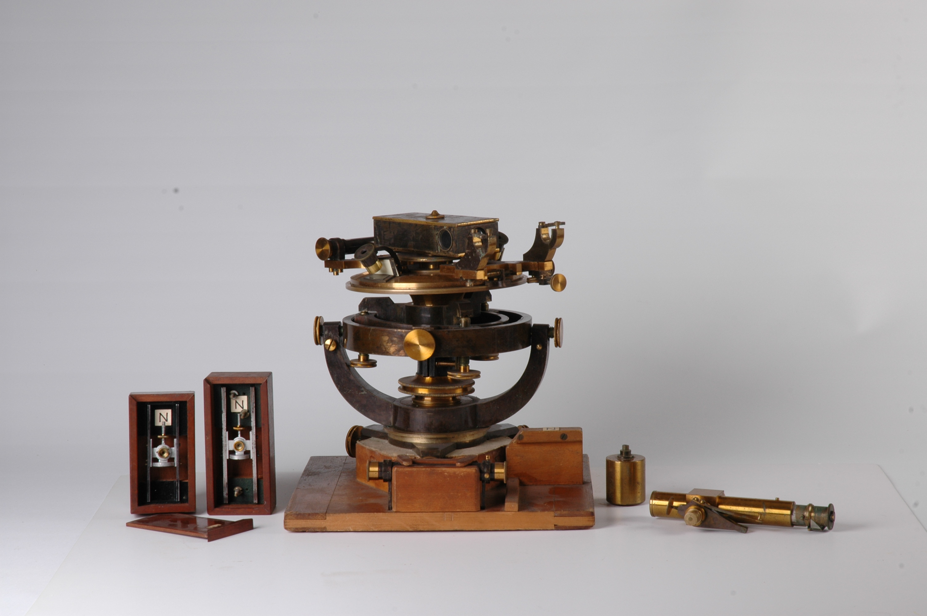 Deklinatorium, et instrument for å bestemme magnetisk deviasjon (misvisning)